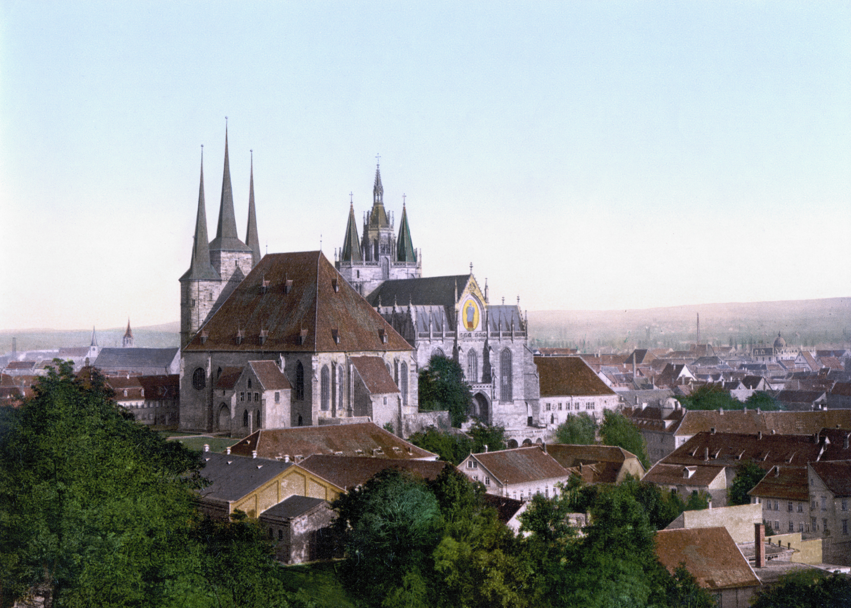 Erfurter Dom um 1900